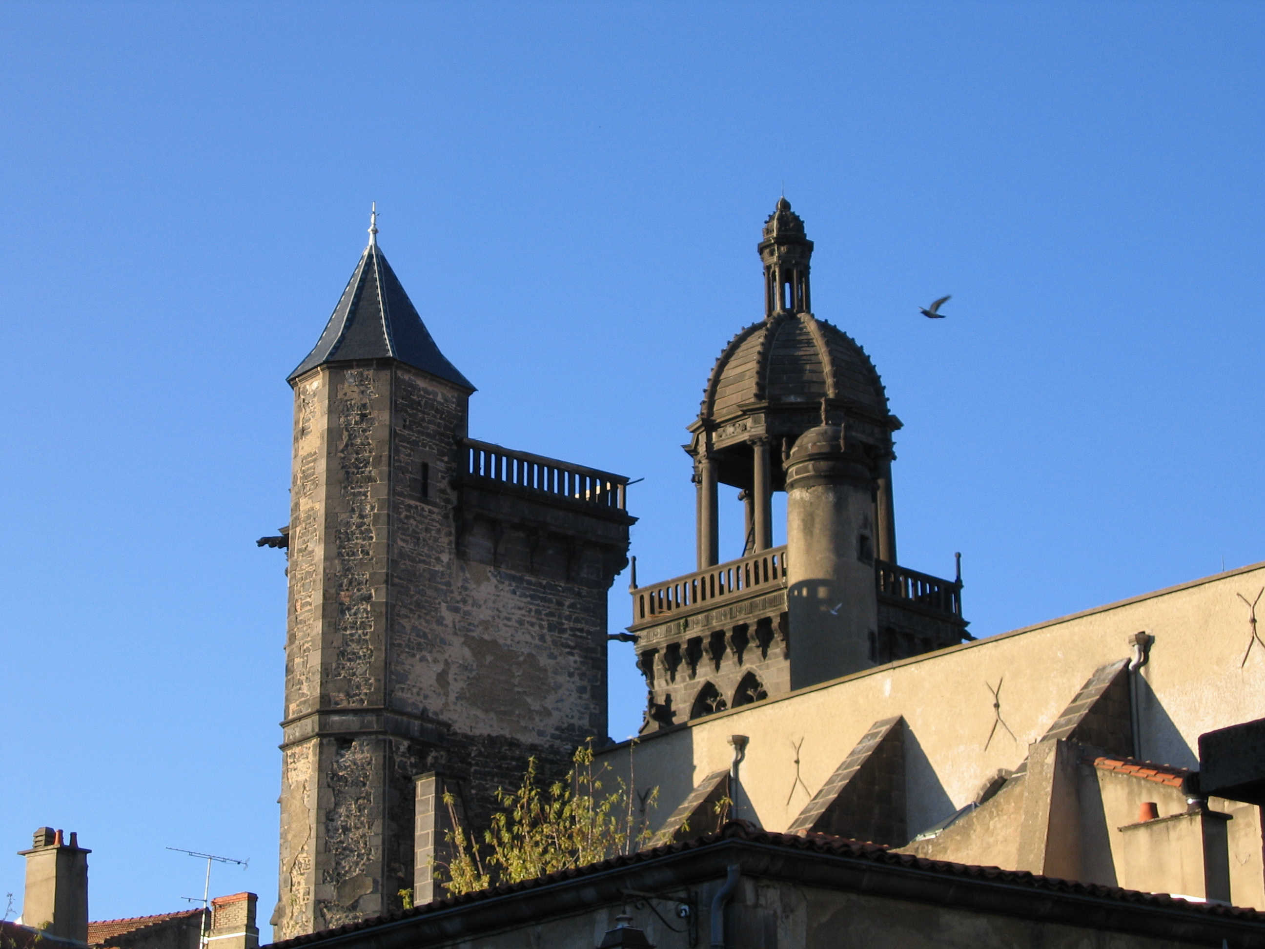 Église du Marthuret, commune de Riom, Puy-de-Dôme, région d'Auvergne. Auteur Jean-Marc Aubelle